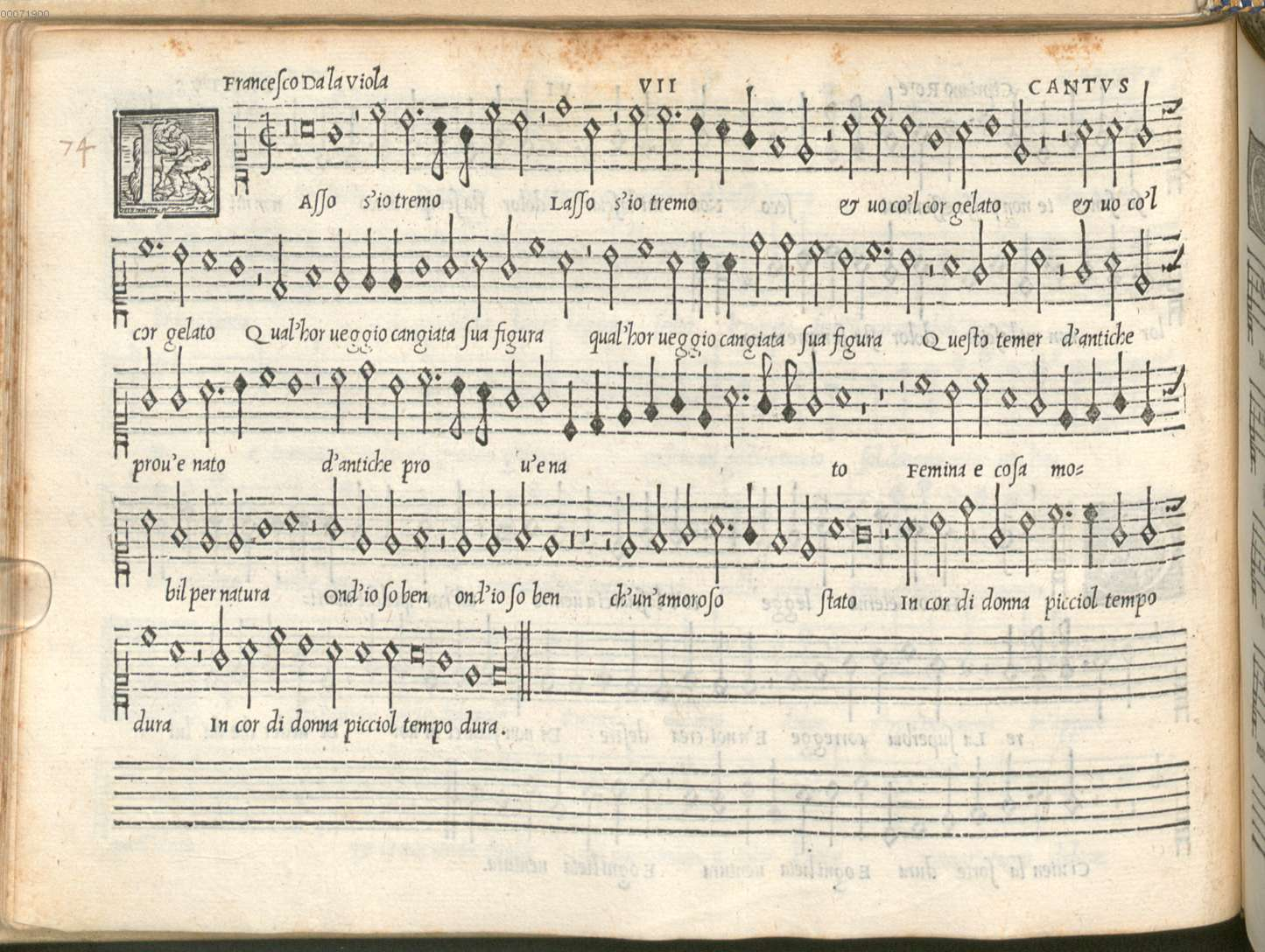 Page d'un madrigal (cantus) de Francesco dalla Viola (Venise, chez Antonio Gardano 1548)